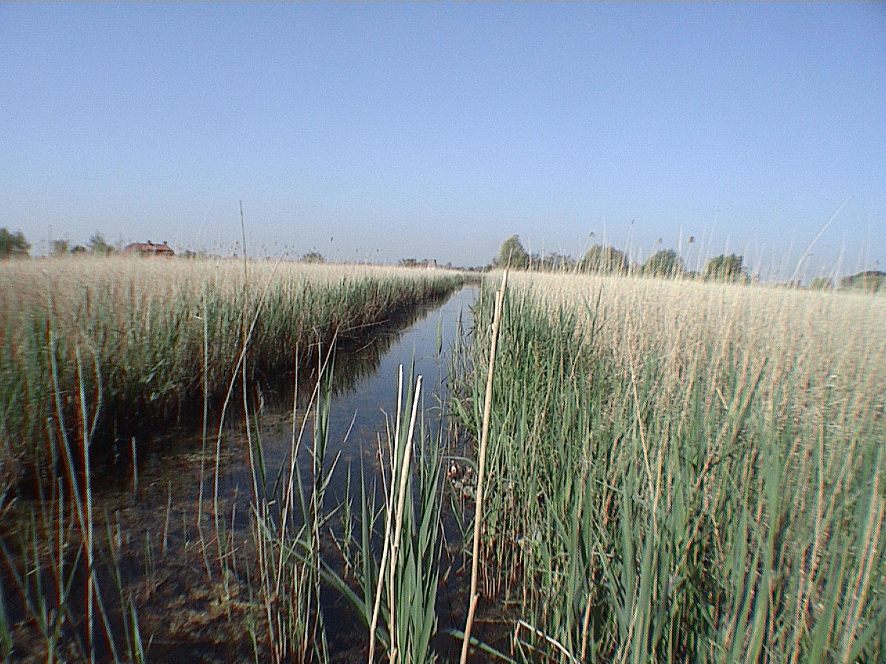 Réserve naturelle nationale des étangs du Romelaëre à Clairmarais